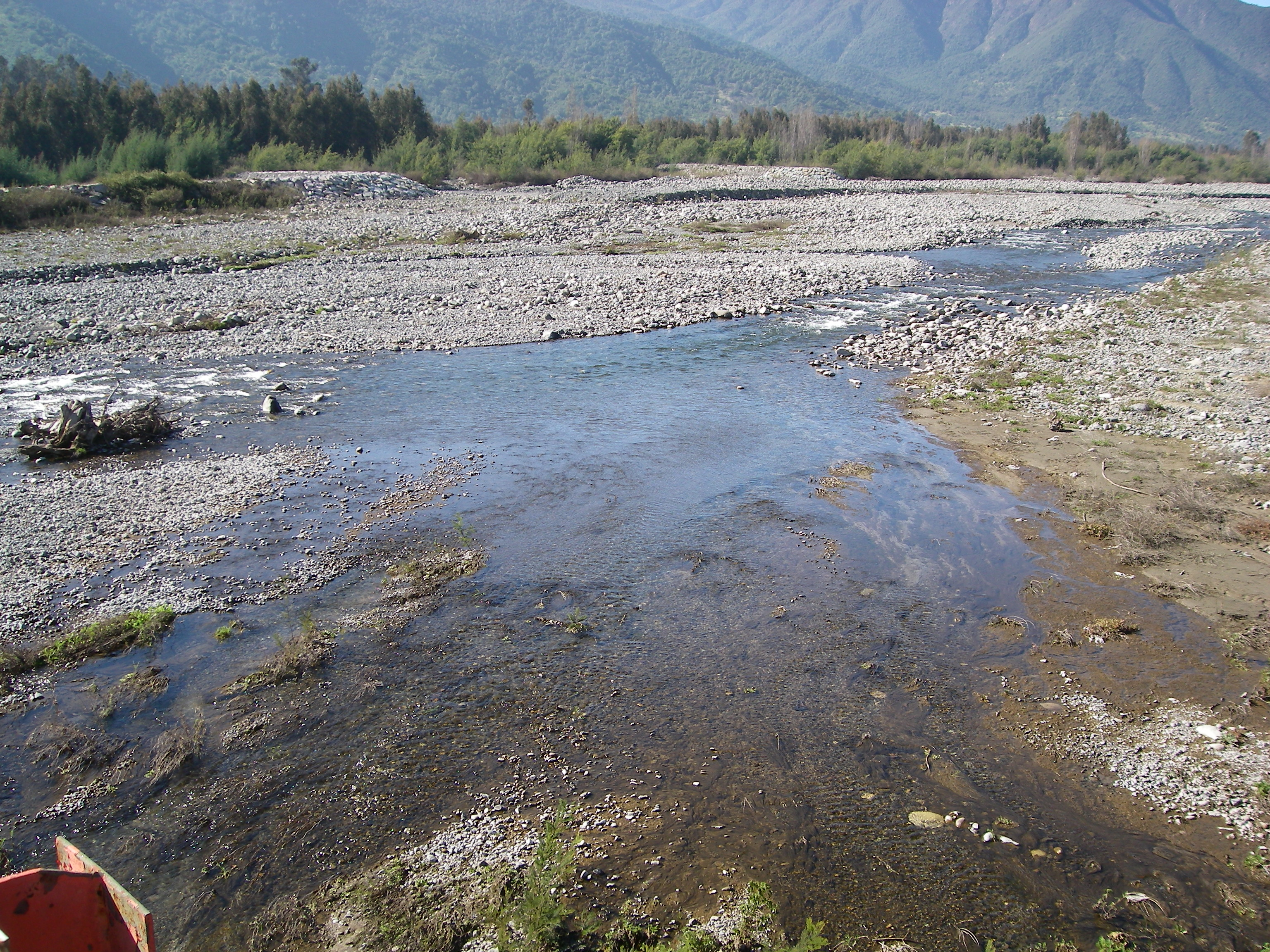 Popeta, Río Claro.